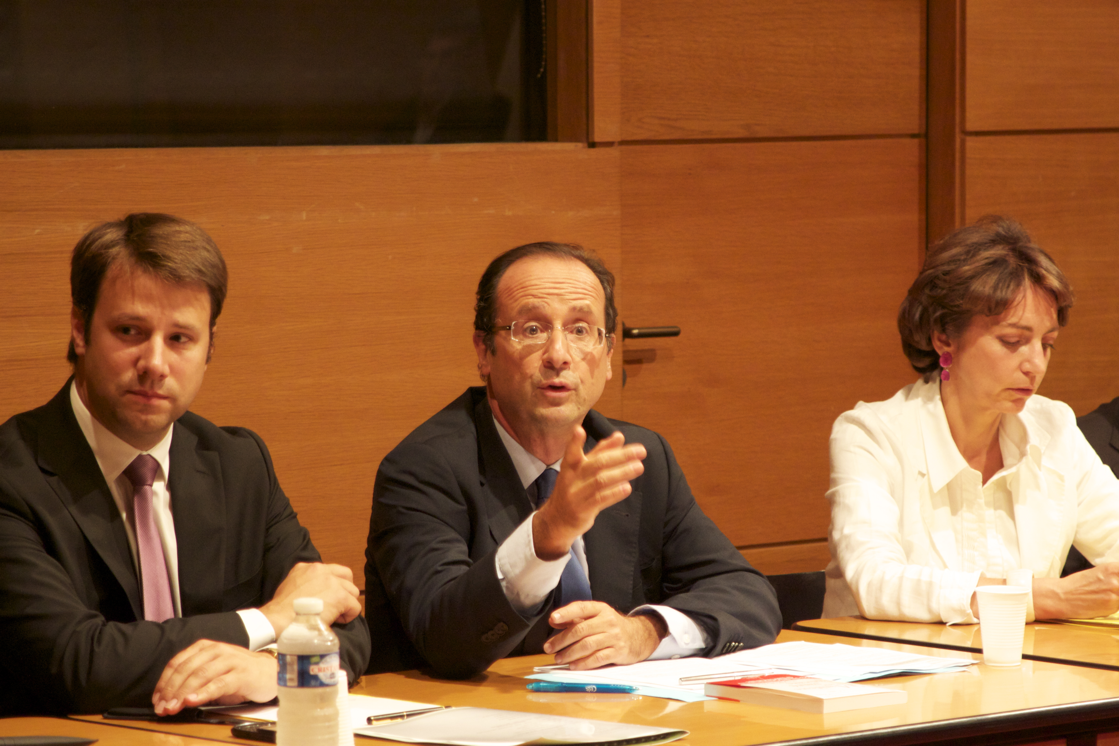 Venue François Hollande à Rennes le 27 septembre 2011. Sur la photo : François Hollande, Marisol Touraine, Loïg Chesnais-Girard